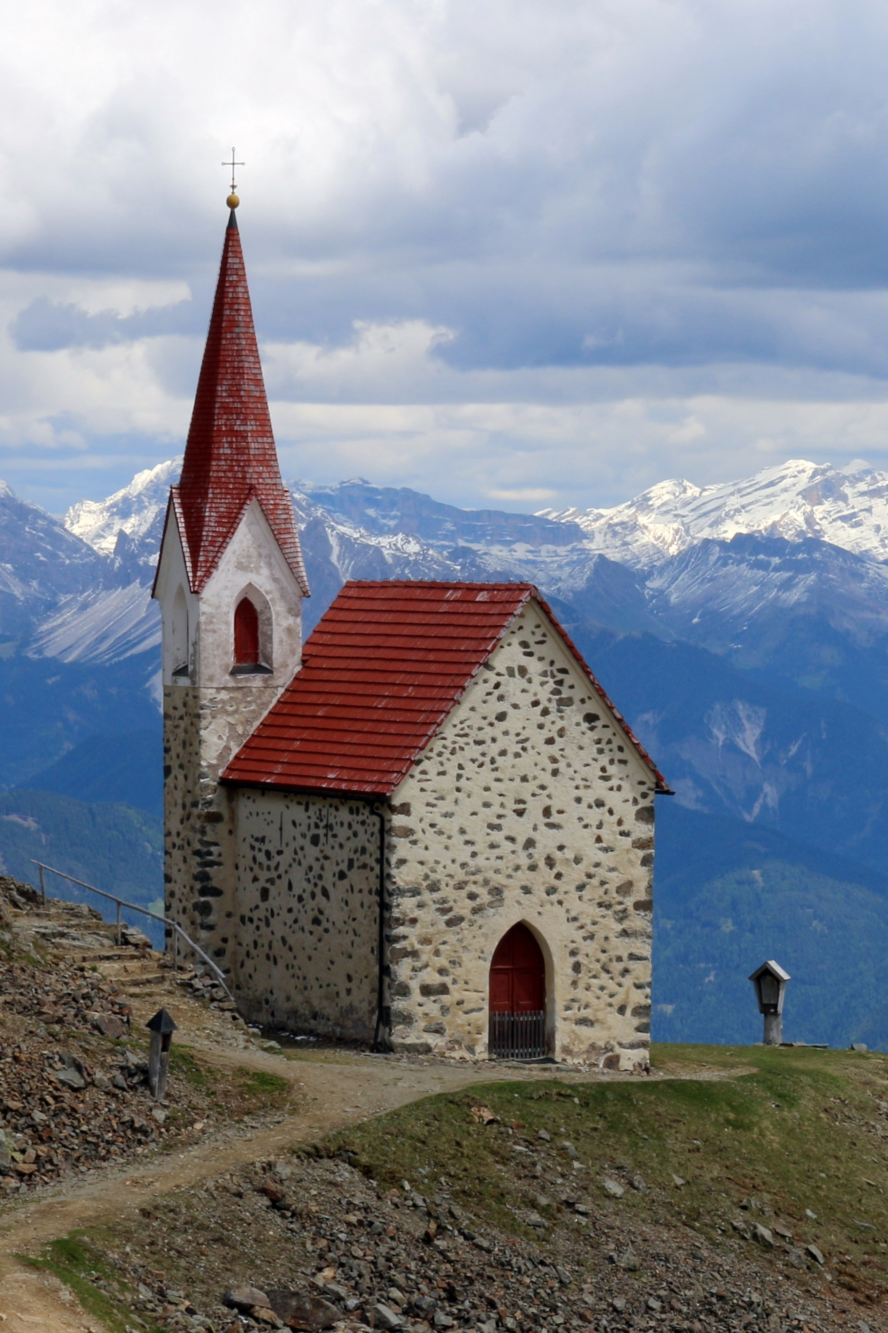 Klausen-Latzfons, Südtirol: Heiligkreuz auf Ritzlar